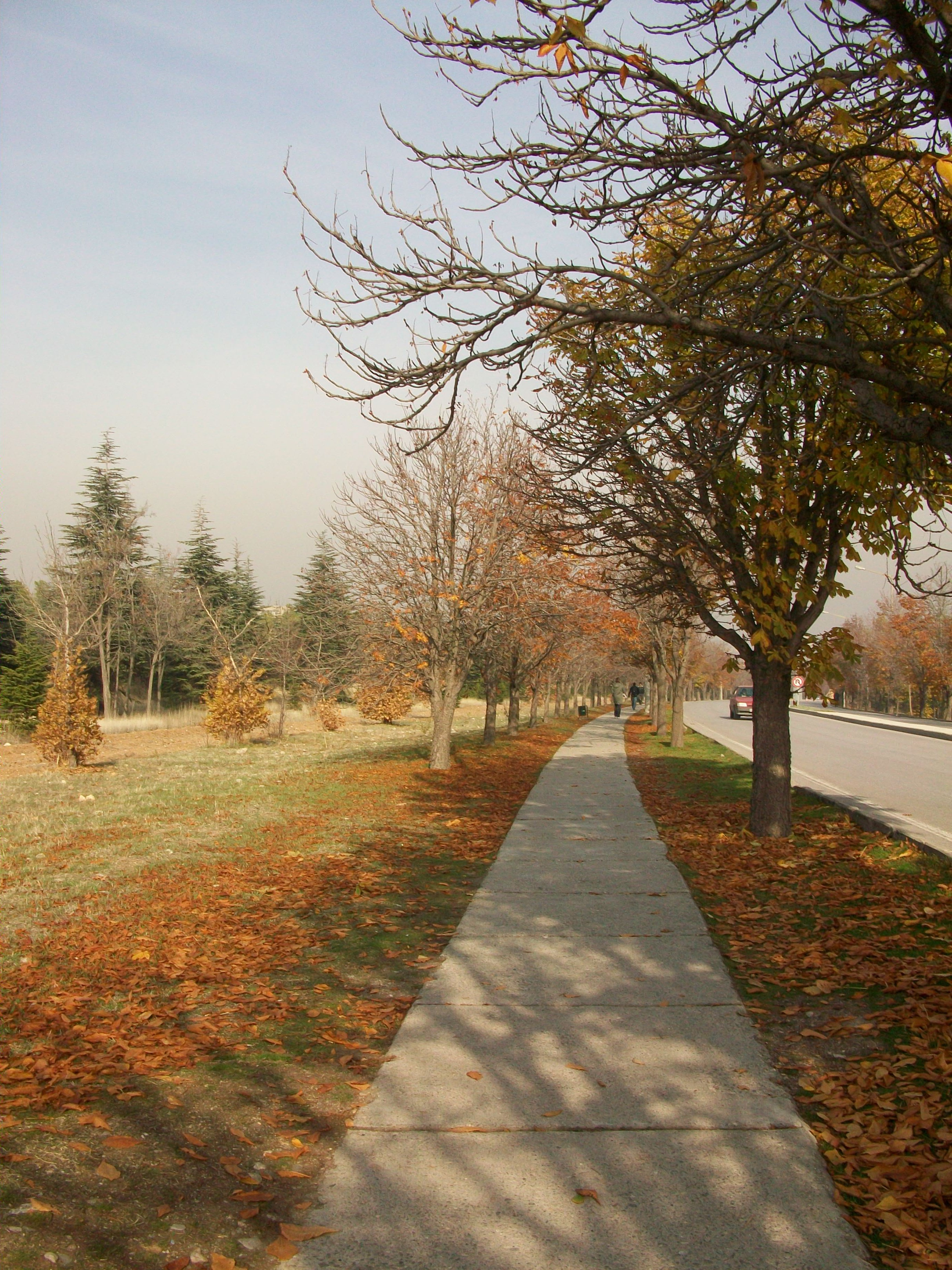 ODTÜ, A1 kapısına giden yol.